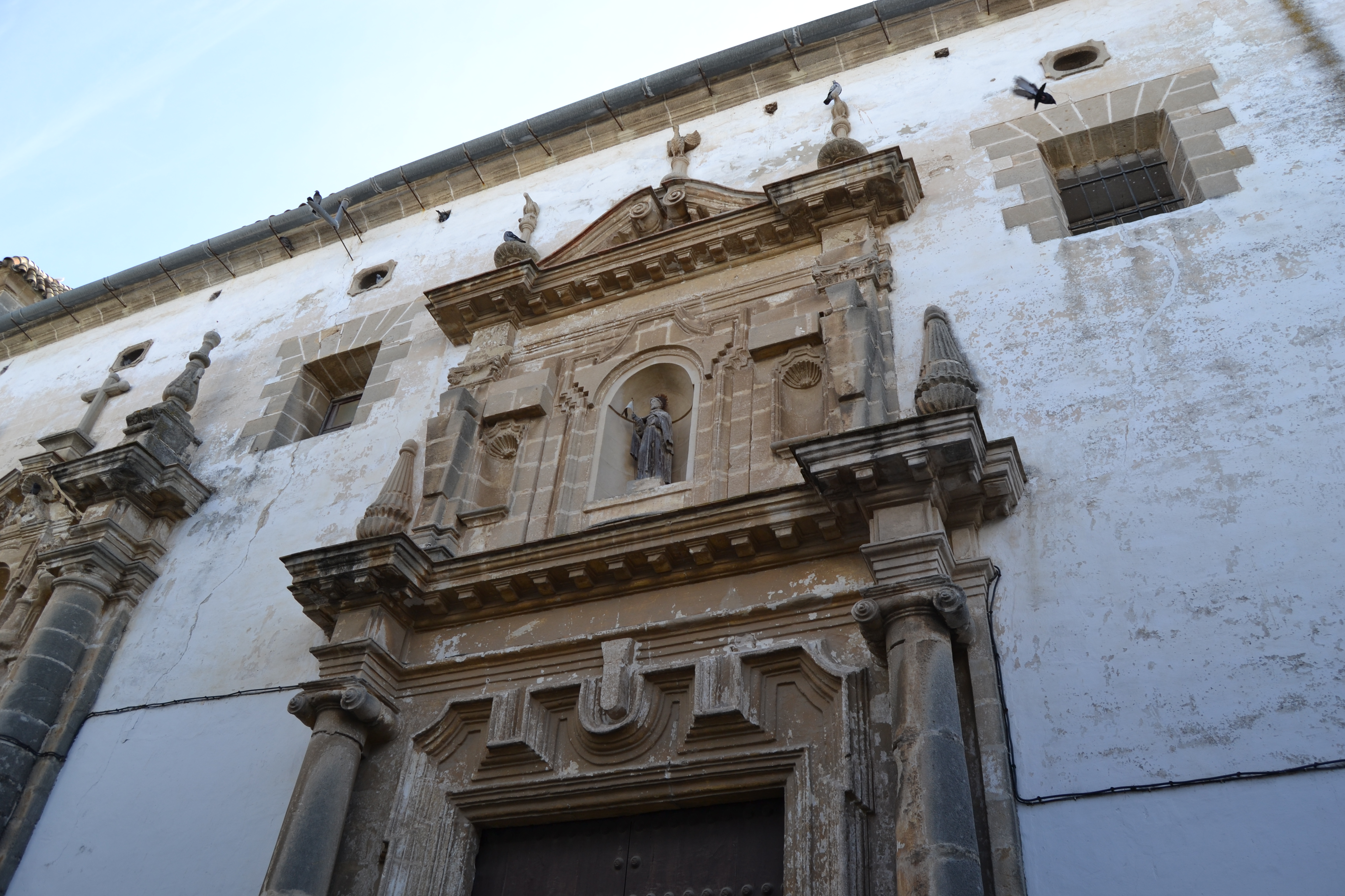 El Puerto de Santa María, Andalucía, España